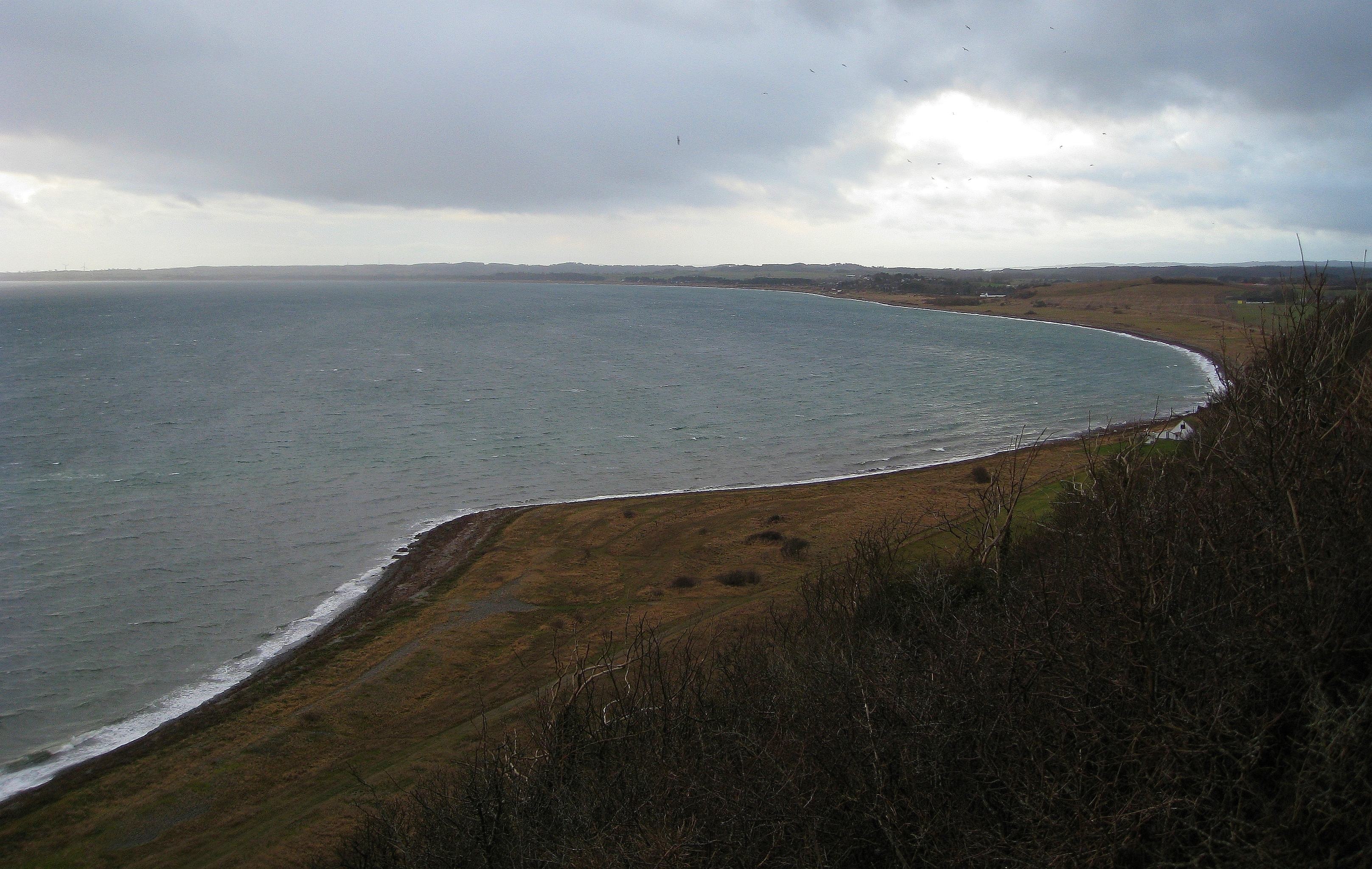 Jernhatten, udsigt mod Dråby Bugt